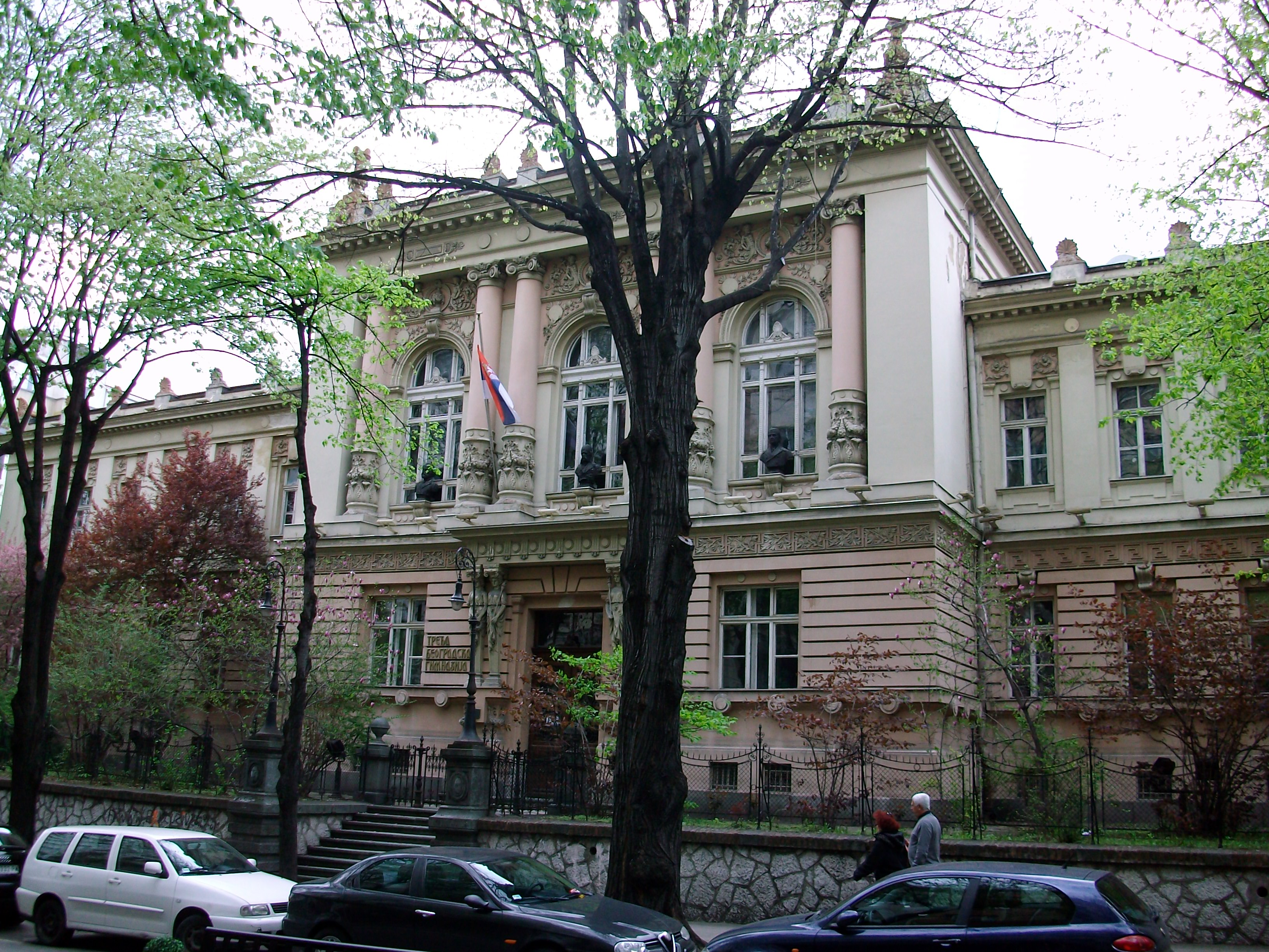 Трећа београдска гимназија / Third belgrade high school